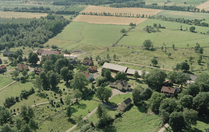 Hjärtanäs radby. Bilden är tagen mot (väderstreck): SV Motiv: Hjärtanäs Nyckelord: Flygbilder, Riksintressen Kategori: JordbruksbyHjärtanäs radby. Bilden är tagen mot (väderstreck): SV.